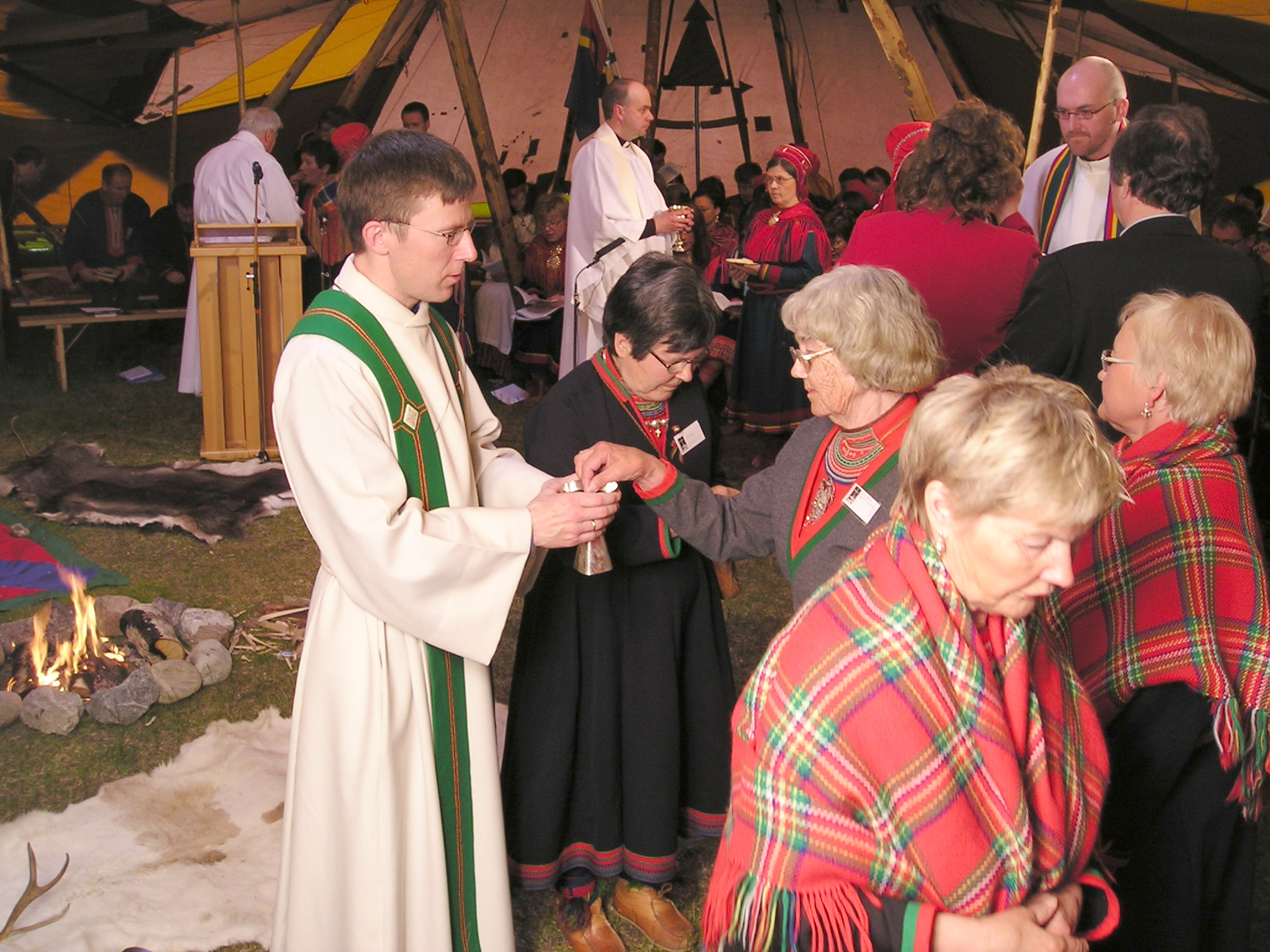 Minister Tore Johnsen celebrating Eucharist in Jokkmokk